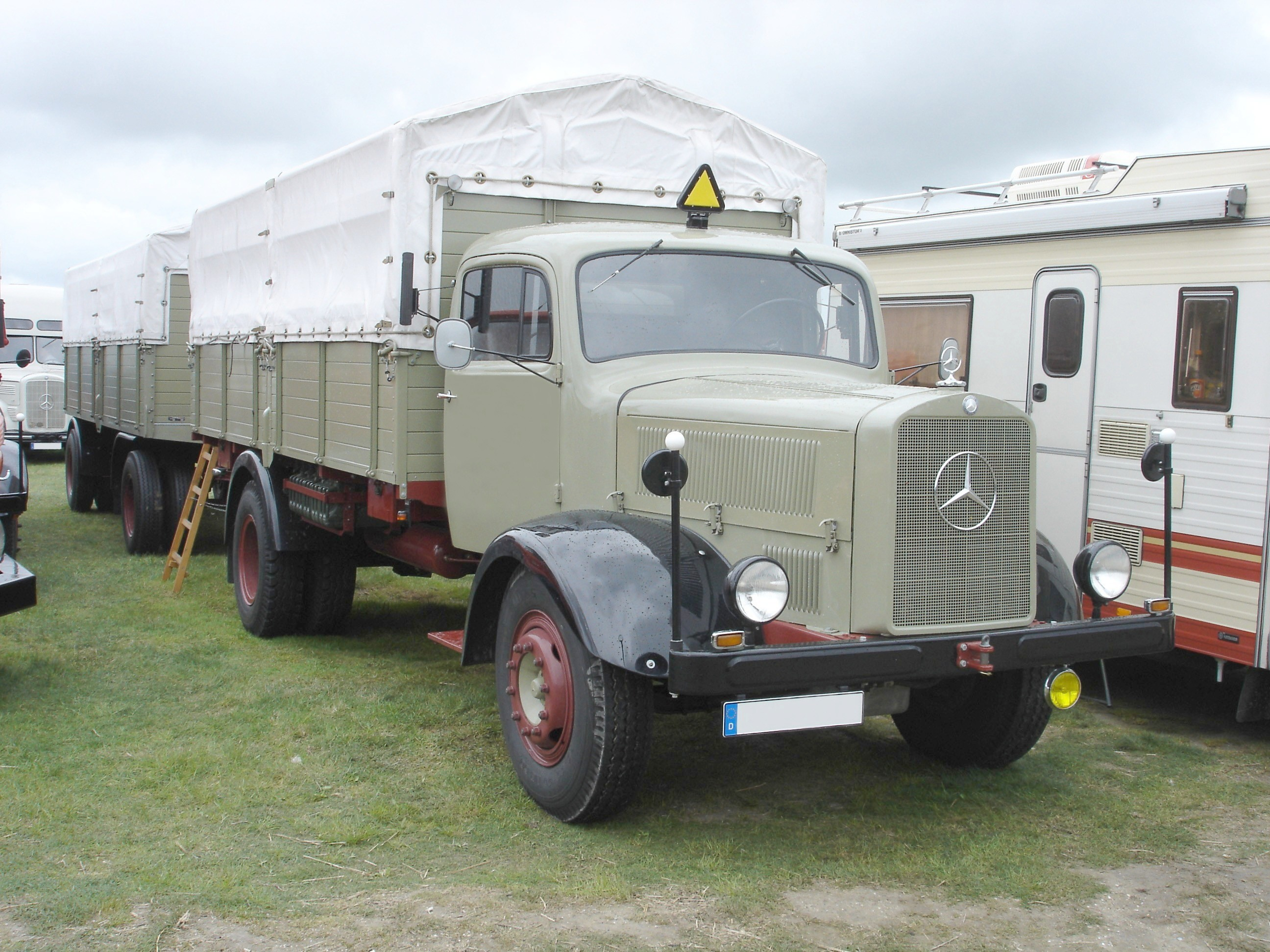 Lkw Mercedes-Benz L5000 Pritschenlastzug